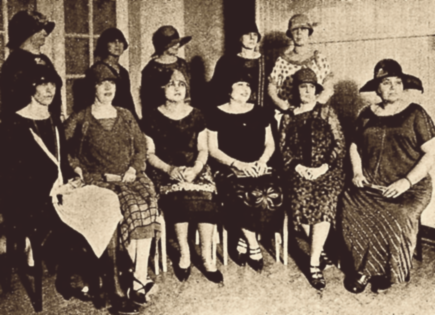 Reunião preparatória para criação da Academia Feminina de Letras e Ciências, capitaneada pela professora Mercedes Dantas. Na imagem se vê, da esquerda para a direita:(em pé) Viúva Pantoja Leite, dra. Correia Ramalho, Bertha Lutz, Laura Fernandes e Rosalva Martins(sentadas) Heloisa Lutz, Albertina Bertha, Mercedes Dantas, Ivetta Ribeiro, Esther Ferreira Vianna e Áurea Pires da Gama.